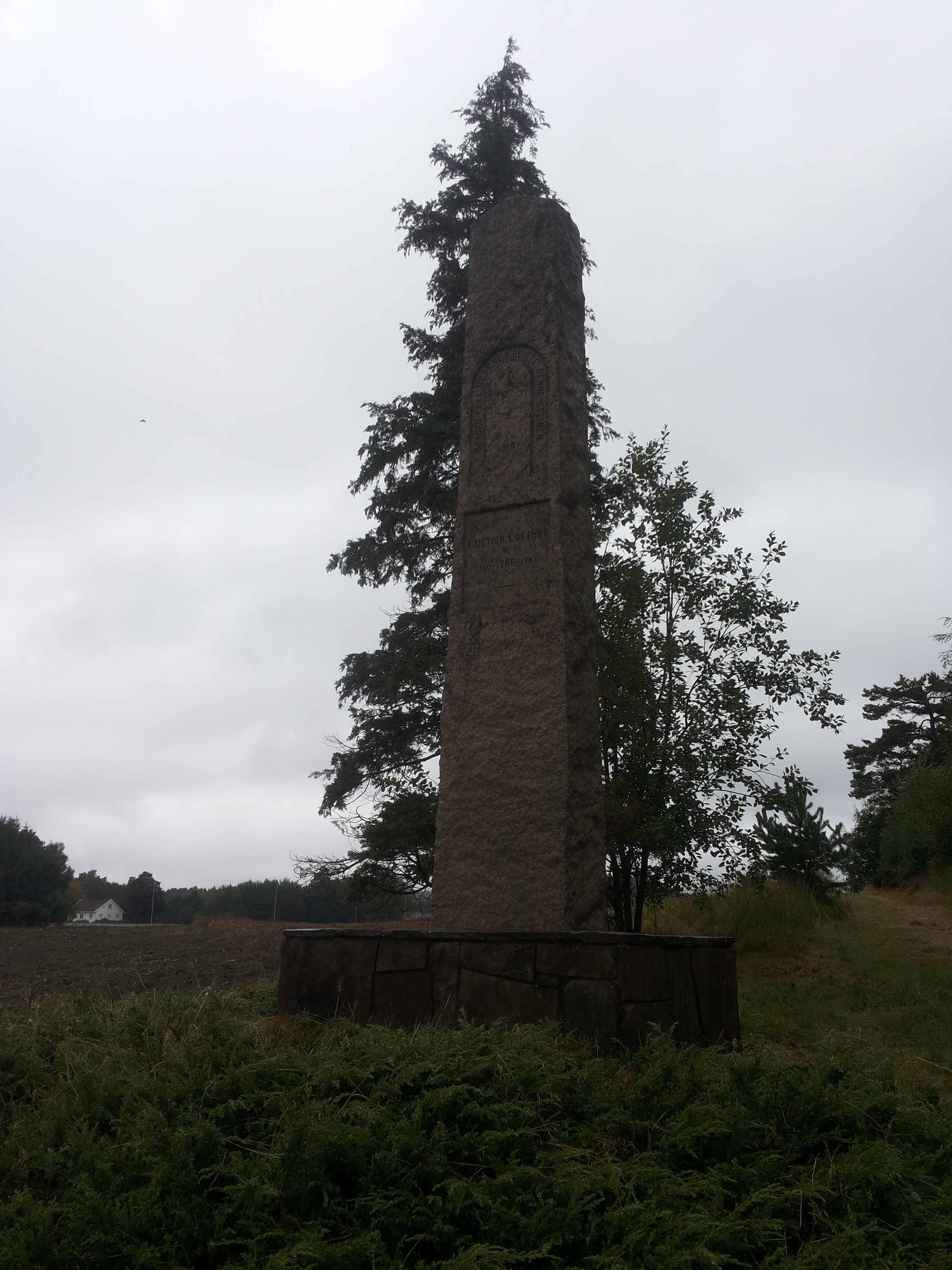 Lofthusbautaen